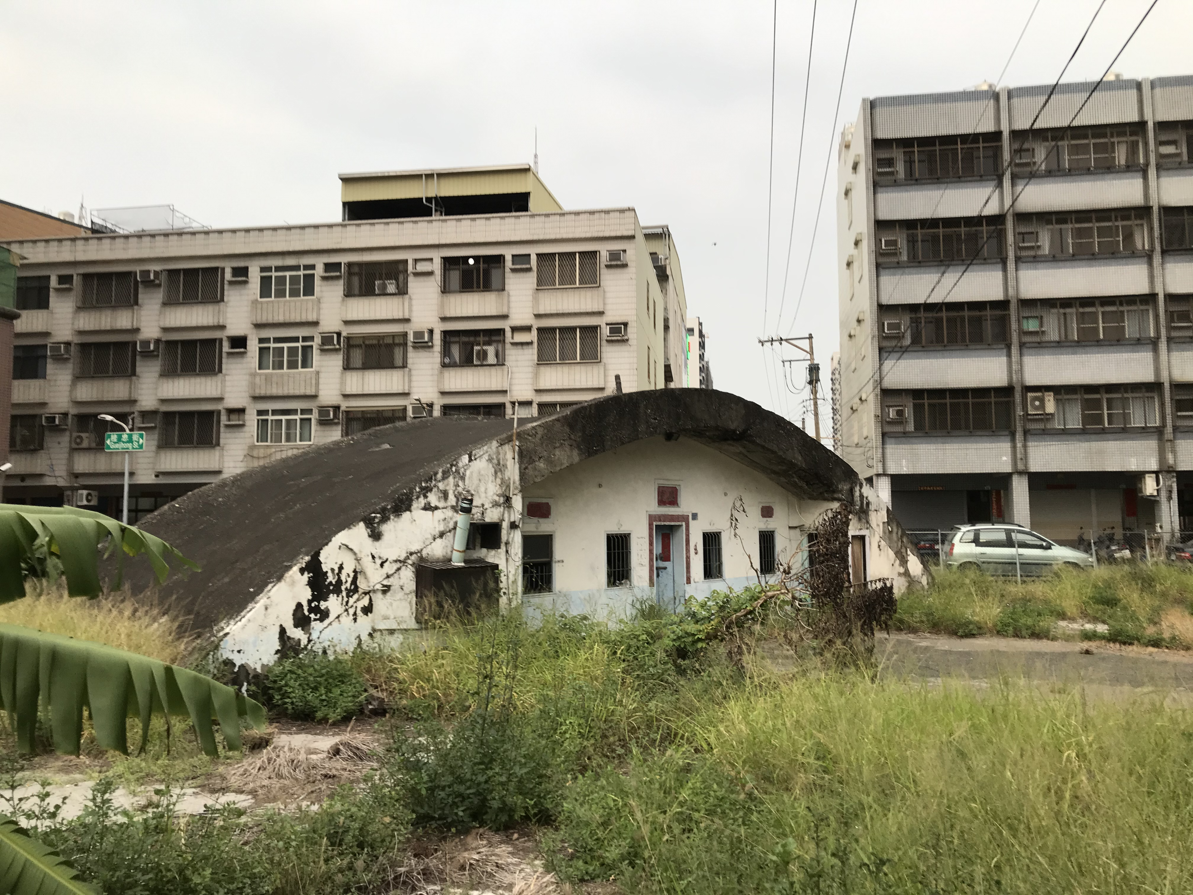 日本陸軍の高雄飛行場掩体壕を転用した家屋。